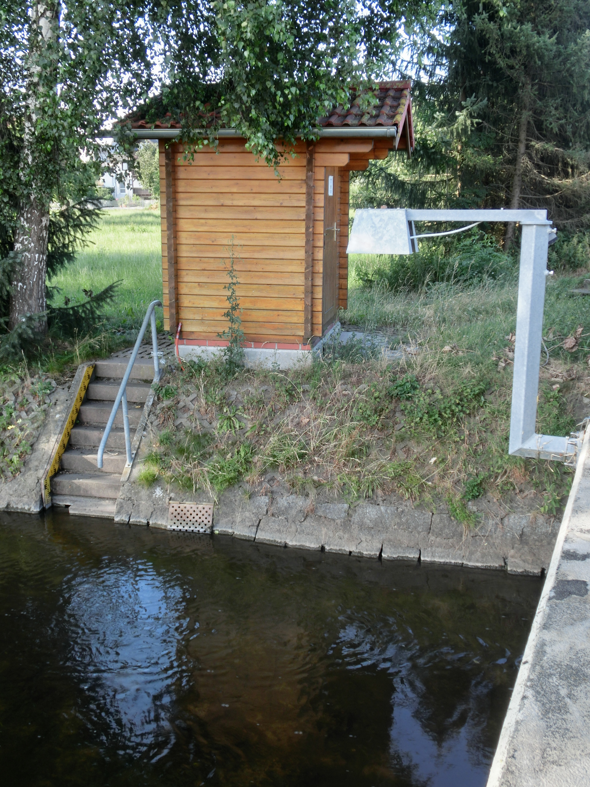 Deutschland (D) - Baden-Württemberg (BW) - Landkreis Sigmaringen (SIG) - Ostrach, Ortschaft Jettkofen: Pegel an der Repperweiler Straße über die Ostrach